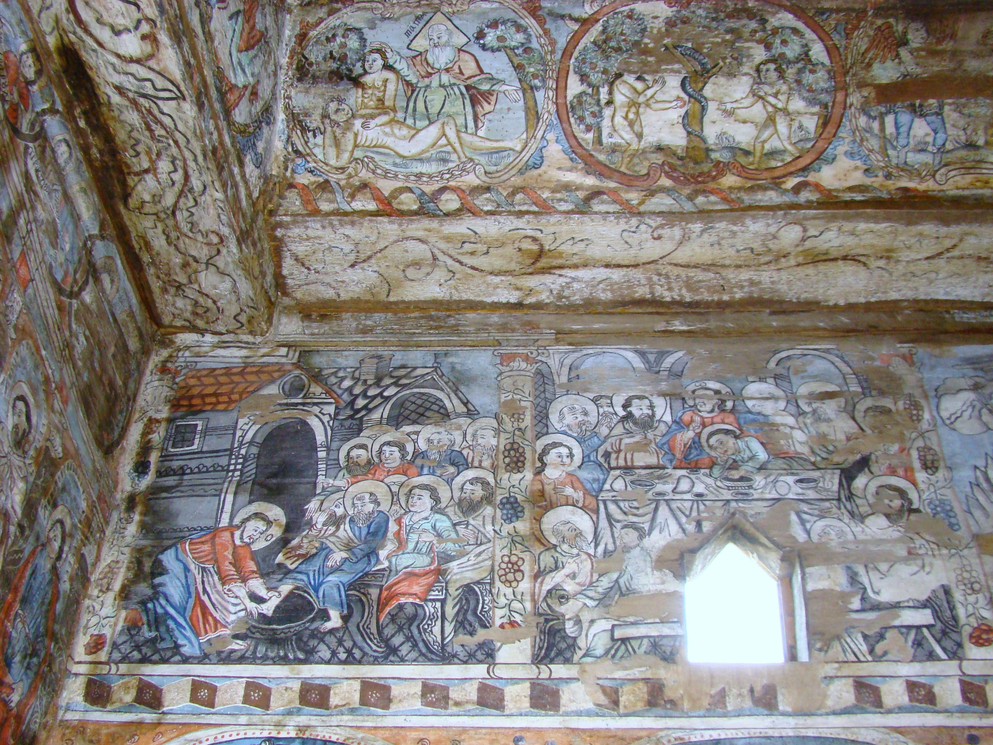 Biserica de lemn "Intrarea Maicii Domnului în Biserică" , sat BÂRSANA